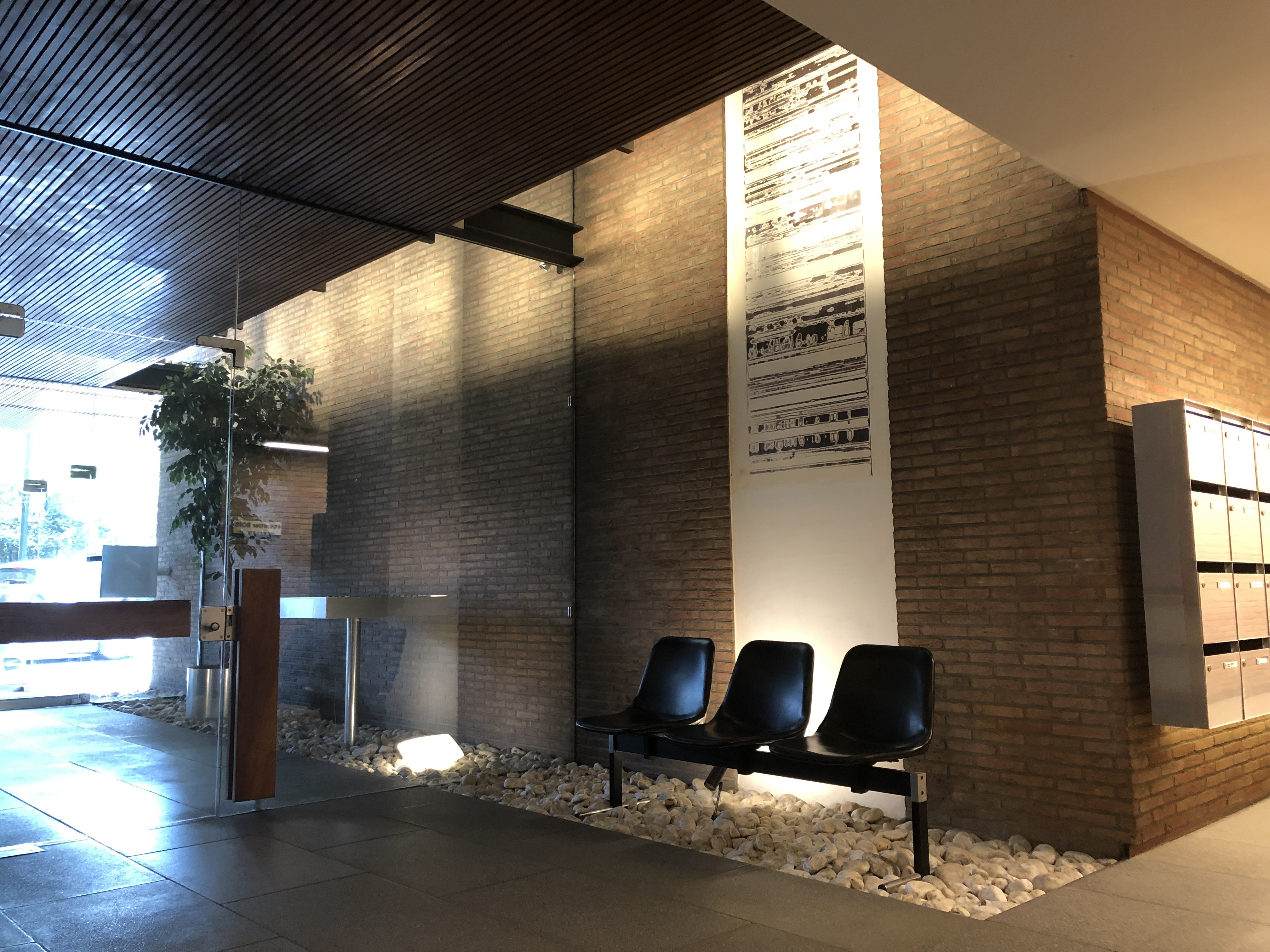 Chimigramme de Pierre Cordier, hall d'entrée, oeuvre d'art avec tâches noires sur fond blanc, fauteuils plastique en premier plan, dalle béton, porte vitrée